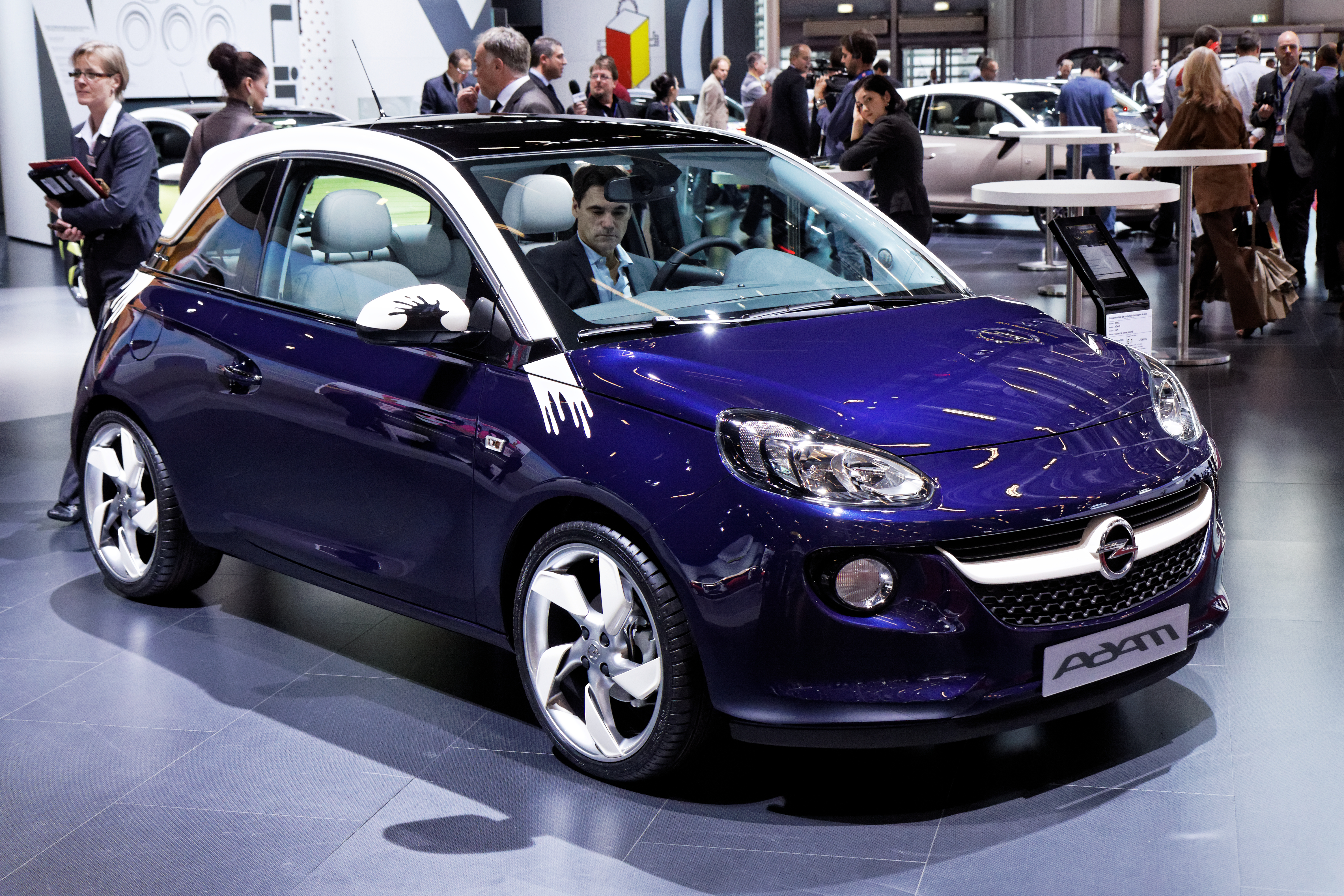 Une d'Opel Adam présentée lors du Mondial de l'automobile de Paris 2012.